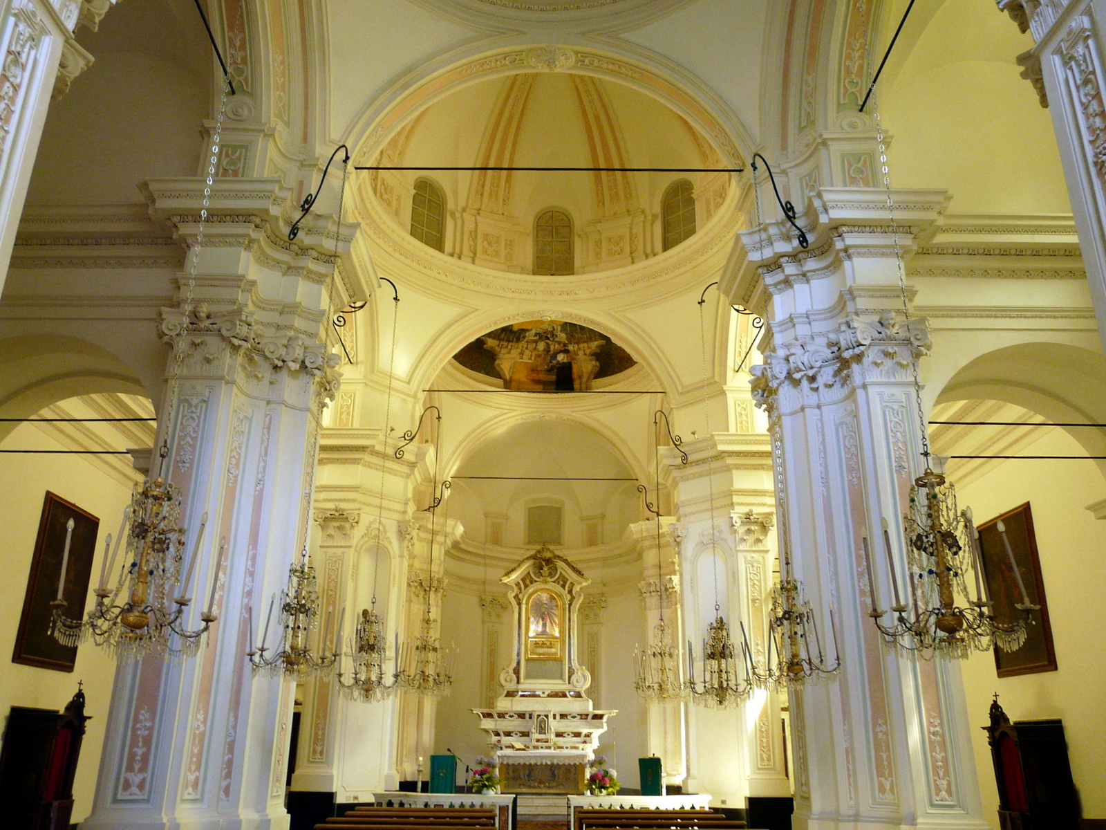 La navata centrale del santuario di Nostra Signora delle Tre Fontane, Tre Fontane, Montoggio, Liguria, Italia